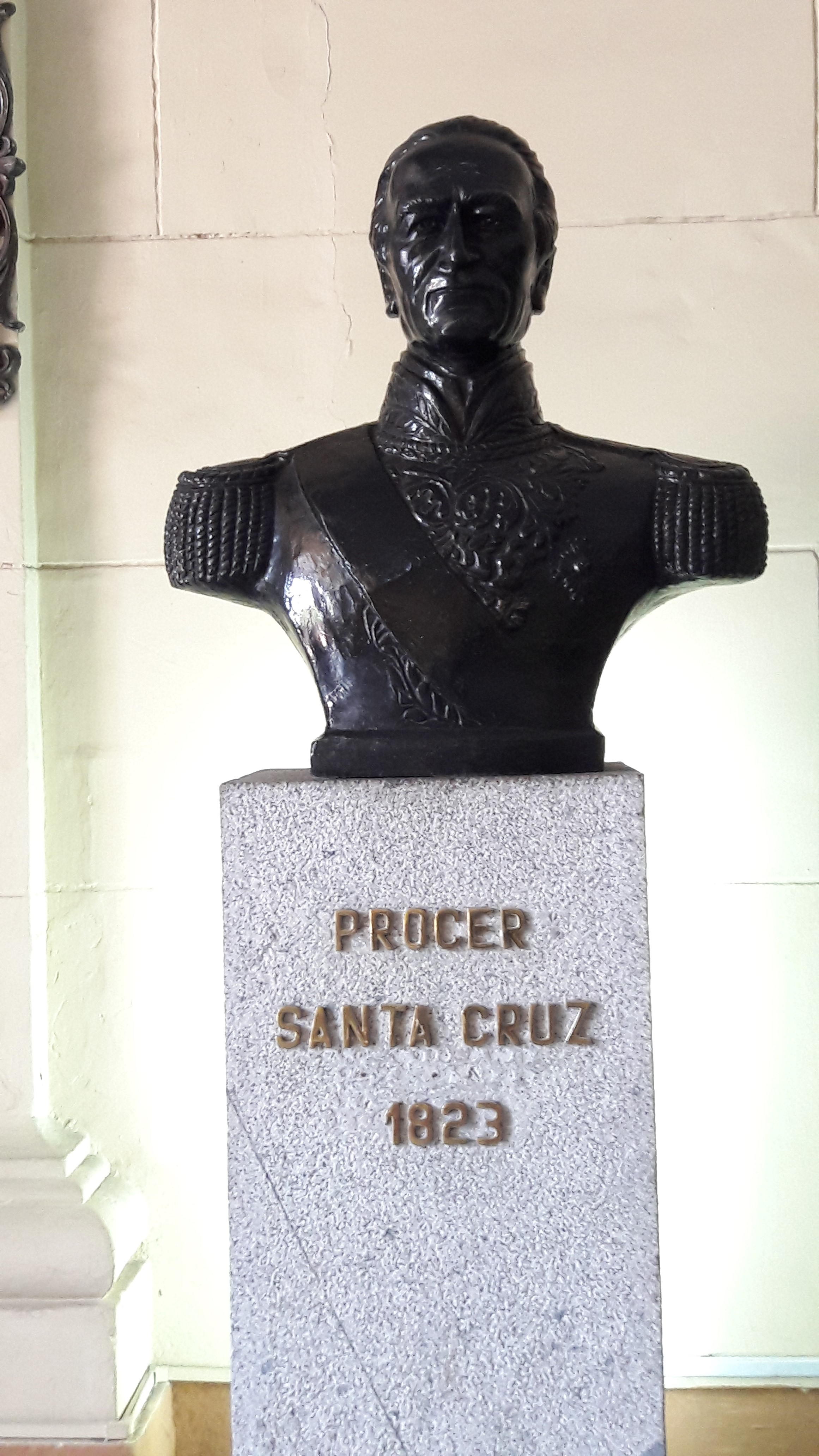 Prócer Santa Cruz 1823